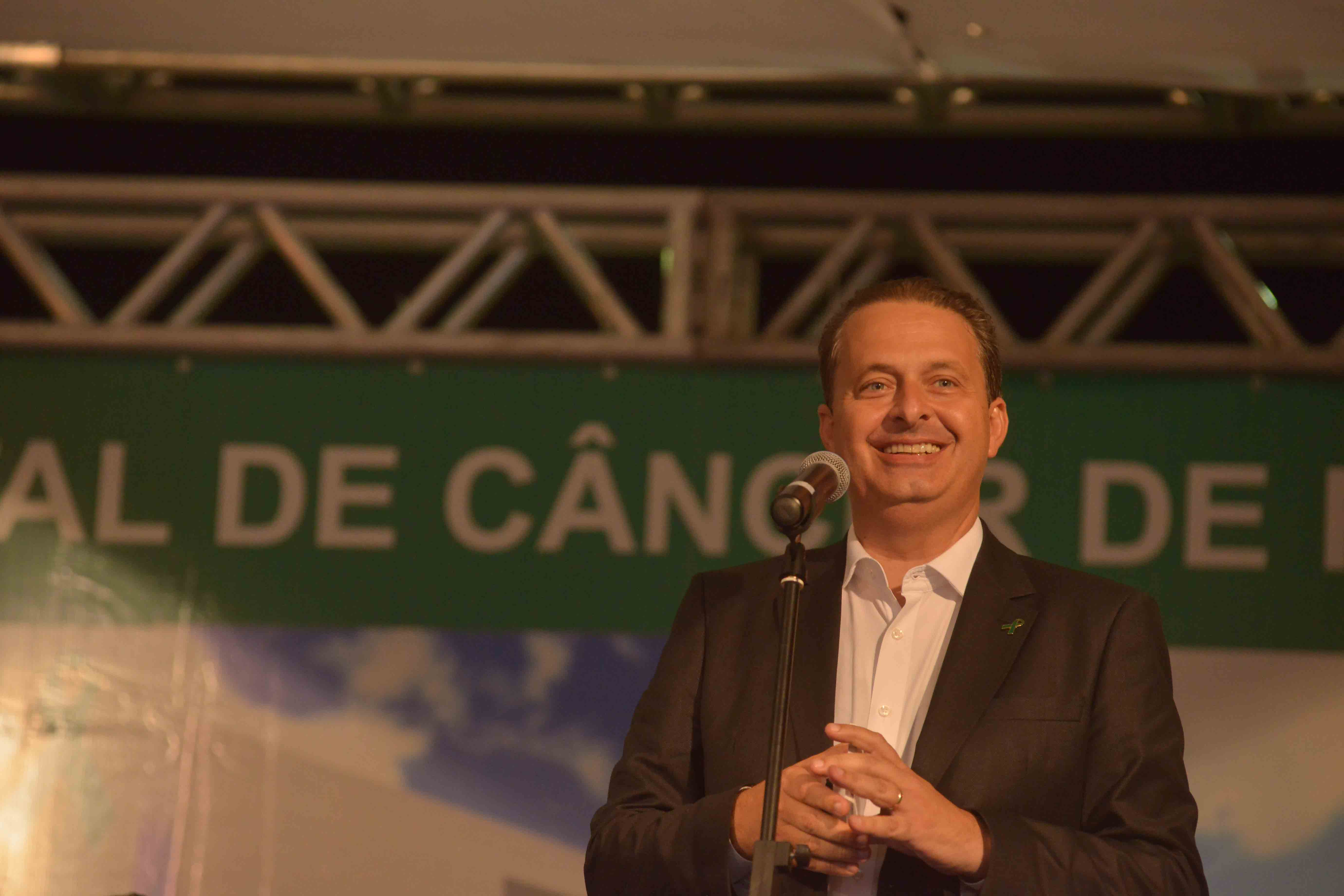 Inauguração do bloco anexo do Hospital do Câncer - PE Foto: Eduardo Braga/SEI